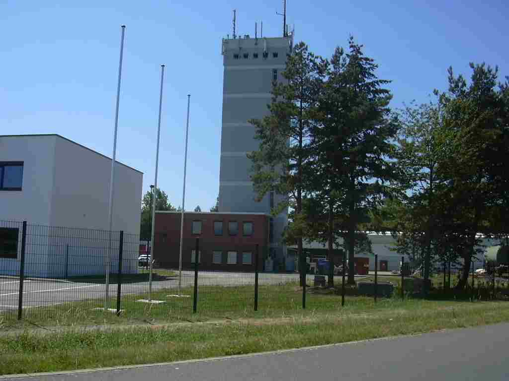 Stockheim bei Kreuzau FTZ own work papa1234 2006-07-14